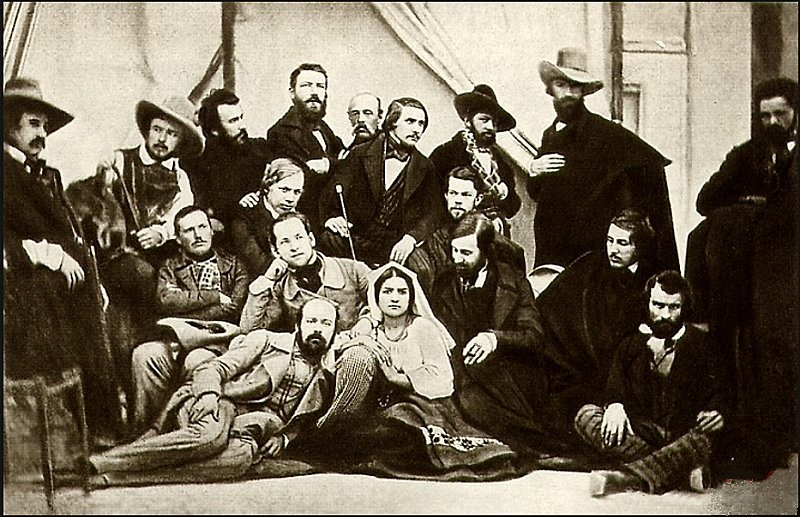 Н. В. Гоголь в группе русских художников в Риме Среди изображённых — архитекторы Фёдор Эппингер, Карл Бейне, Павел Нотбек, Ипполит Монигетти, скульпторы Пётр Ставассер, Николай Рамазанов, Михаил Шурупов, живописцы Пимен Орлов, Аполлон Мокрицкий, Михаил Михайлов, Василий Штернберг.